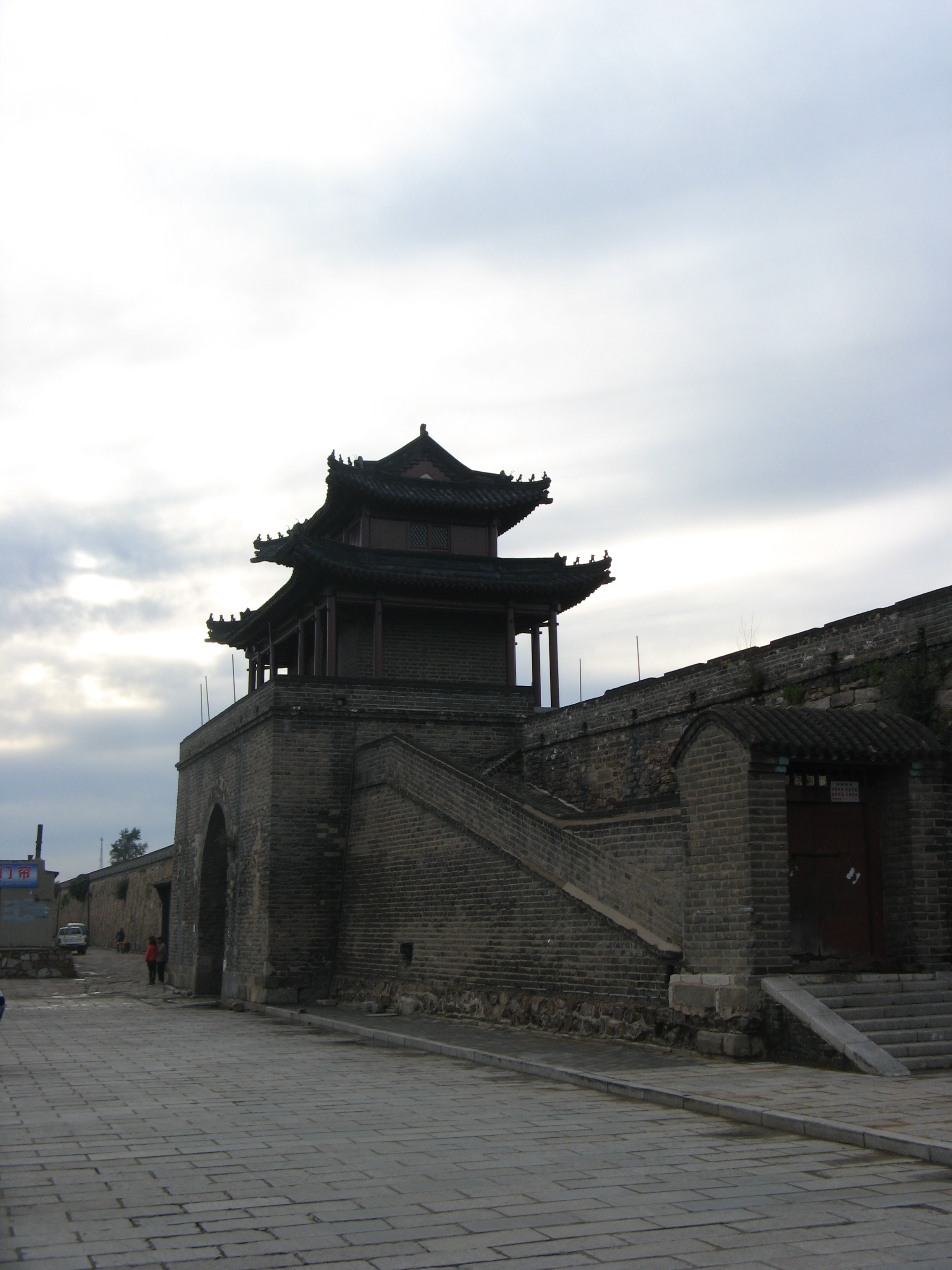 兴城古城北门威远门。